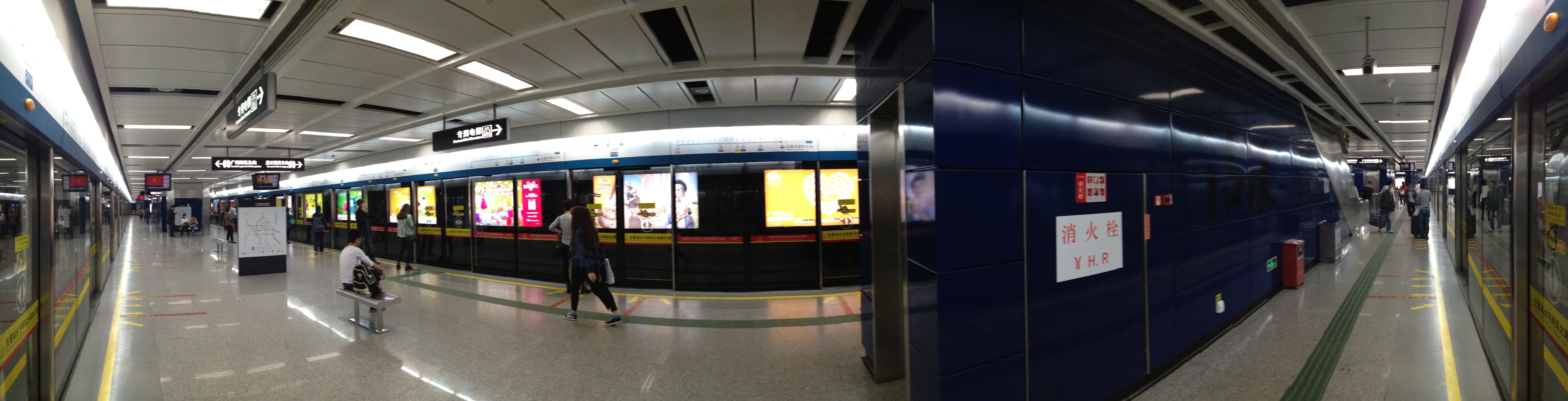 广州地铁2号线洛溪站月台全景图